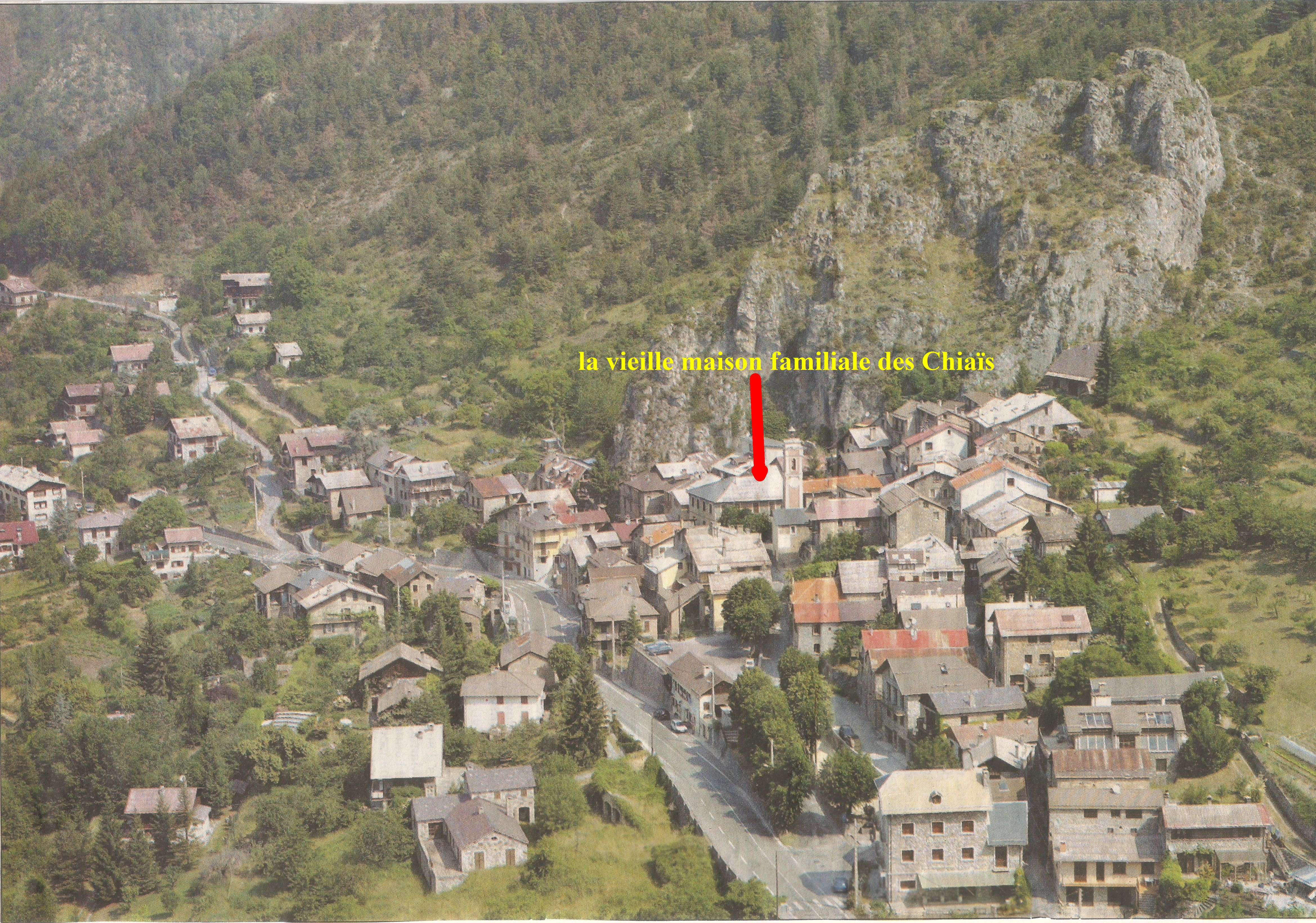 La Roche